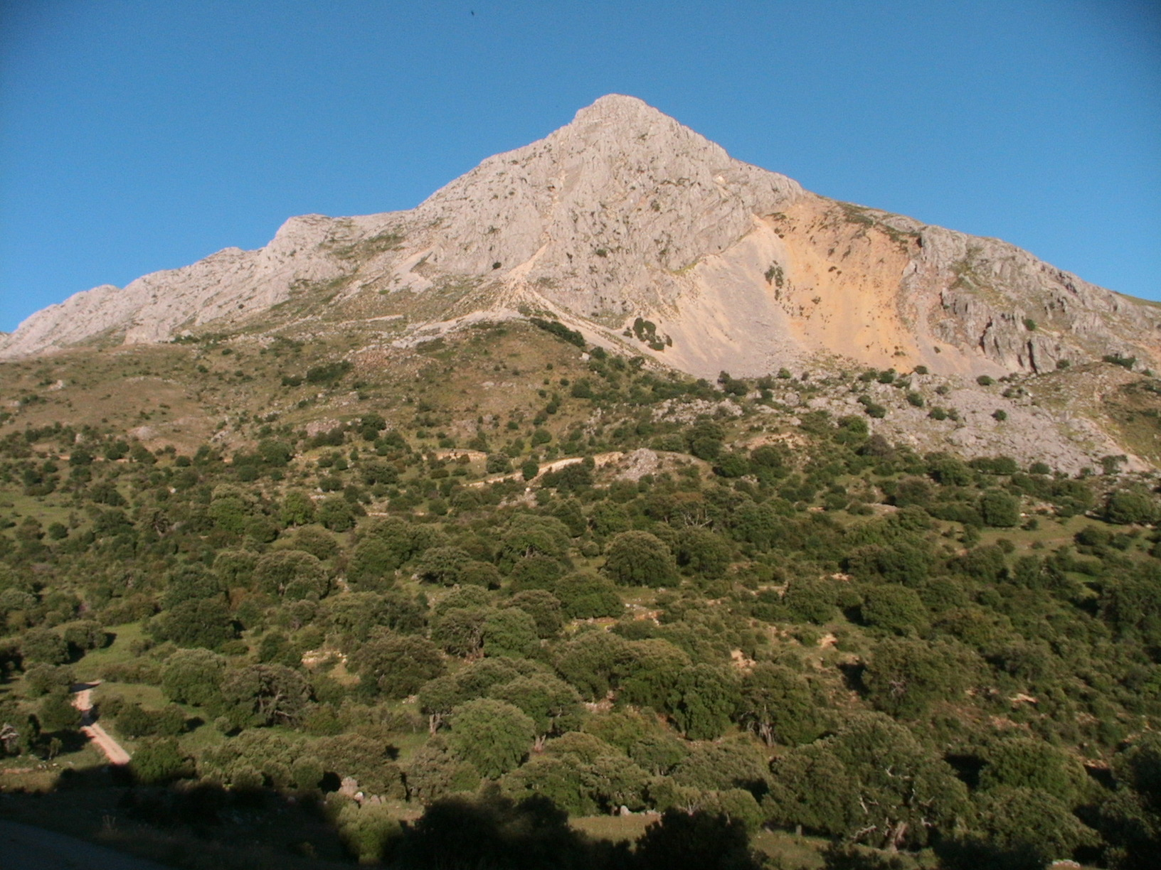 El Macizo Montañoso de Sierra Mágina, cuenta con los Montes de mayor altitud, dentro de la Provincia de Jaén. La "Peña de Jaén", es uno de éllos. This is a photography of a Special Area of Conservation in Spain with the ID: ES6160009. Natura2000 entry, EEA entry